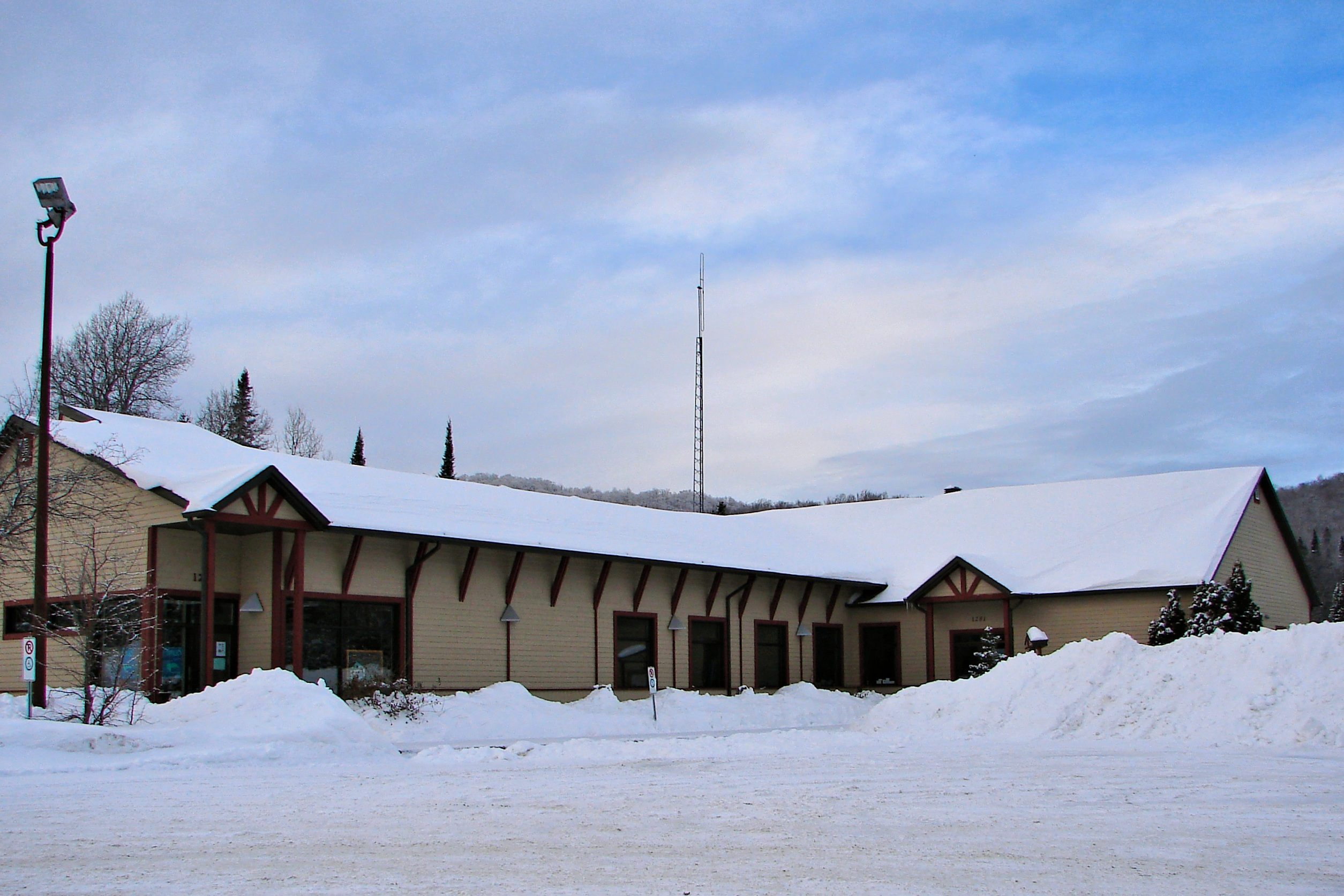 Lac-Supérieur, Quebec, Canada